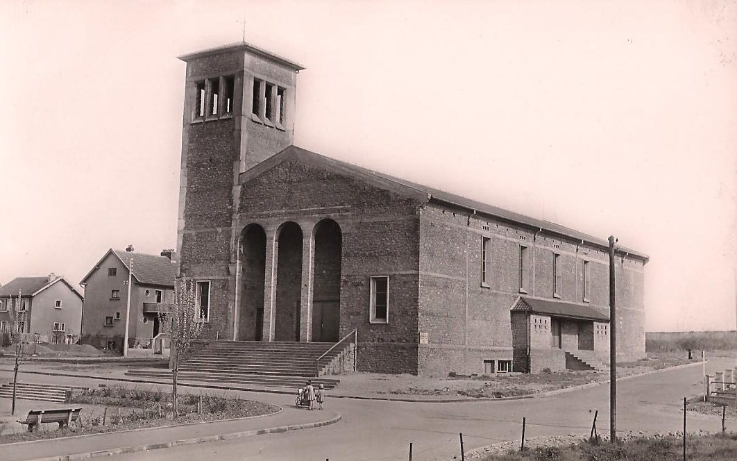 Les murs ne sont pas encore enduits de crépis, on apercoit les pierres de maçonnerie.